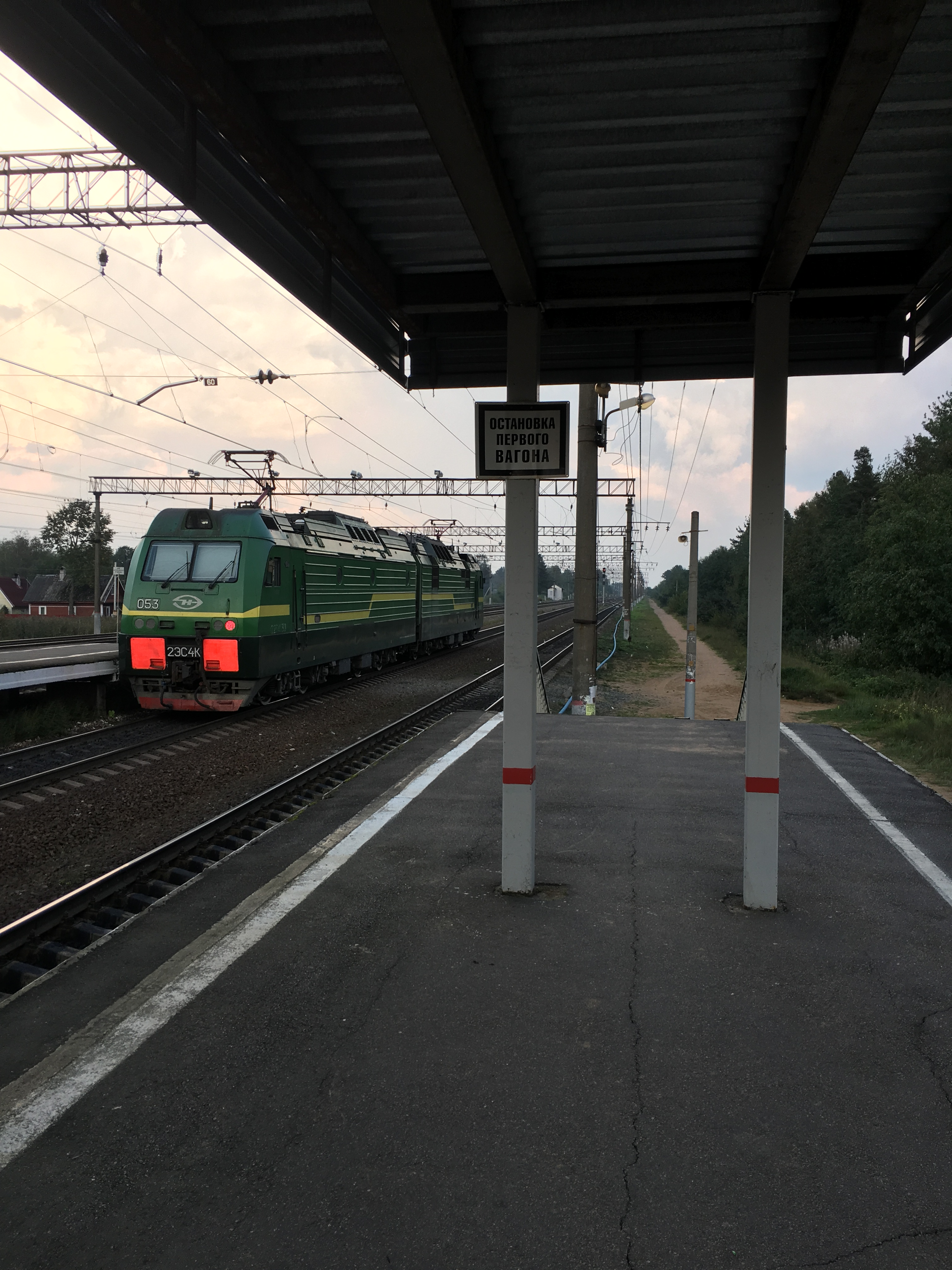 2ЭС4К-053 на станции «Горы»